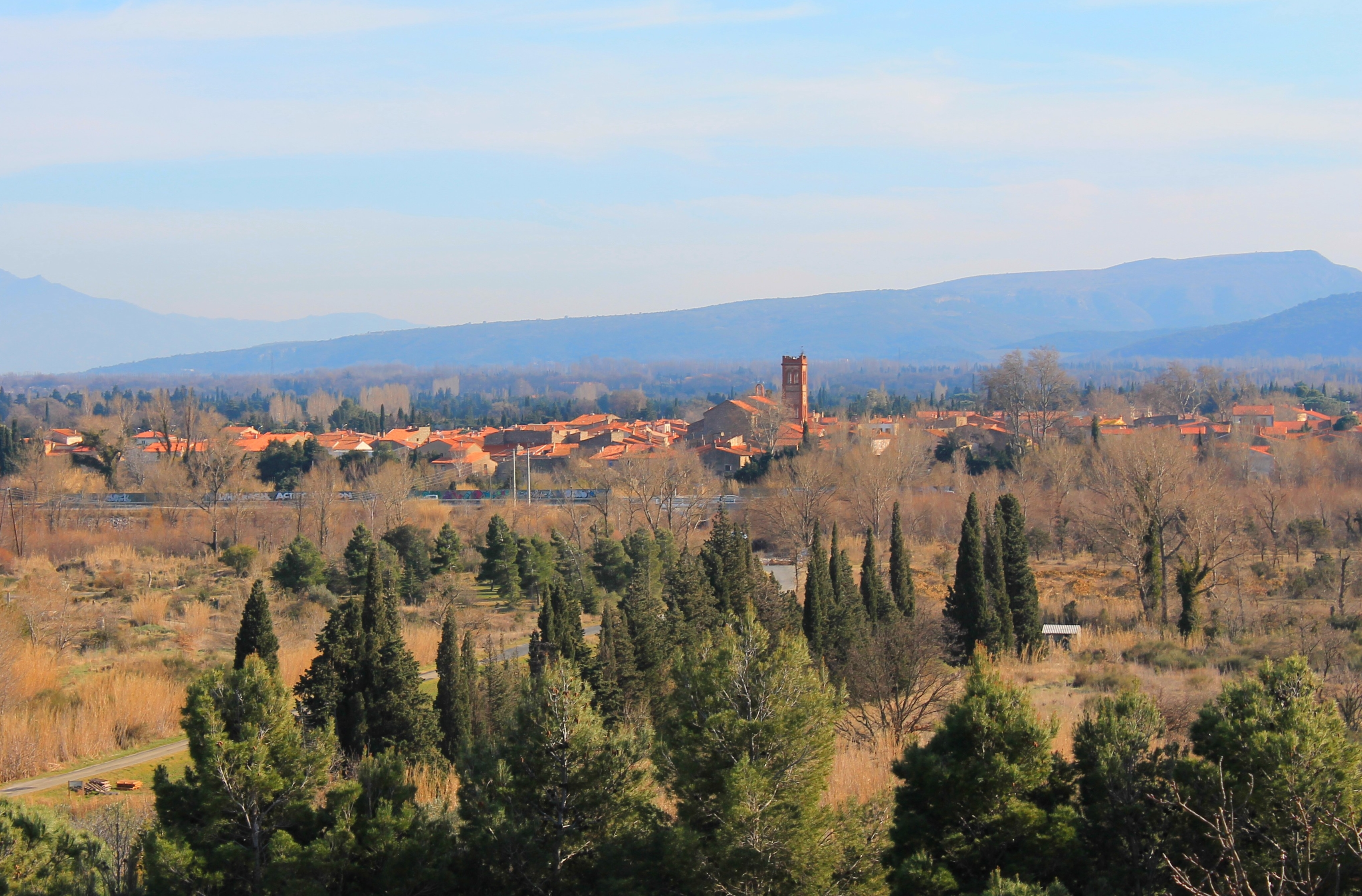 Néfiach